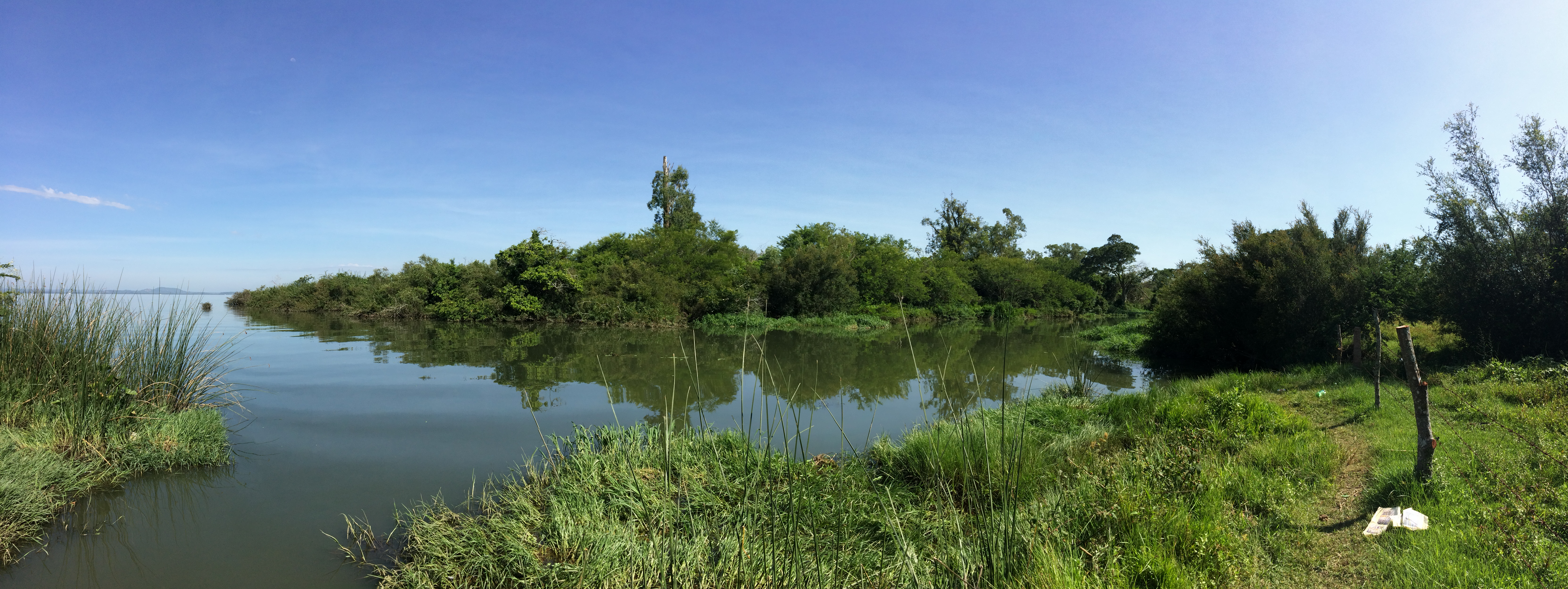 A foz do Arroio do Salso, em Porto Alegre, Brasil.